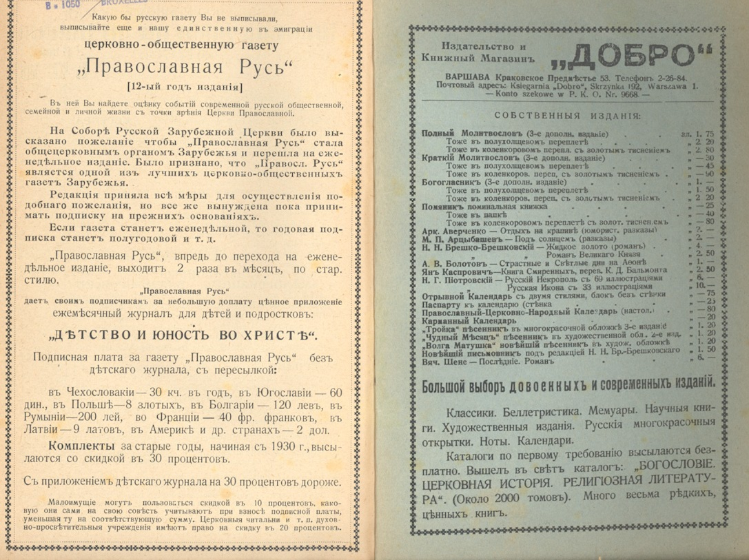 Реклама периодических изданий, выпускавшихся Типографским братством пр. Иова в Владимировой, опубликованная в Календаре 1939 г.